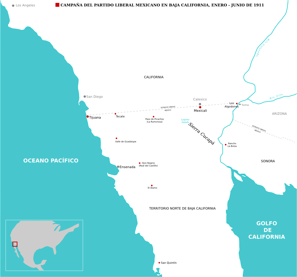 Campaña libertaria del Partido Liberal en Baja California, enero - junio de 1911.